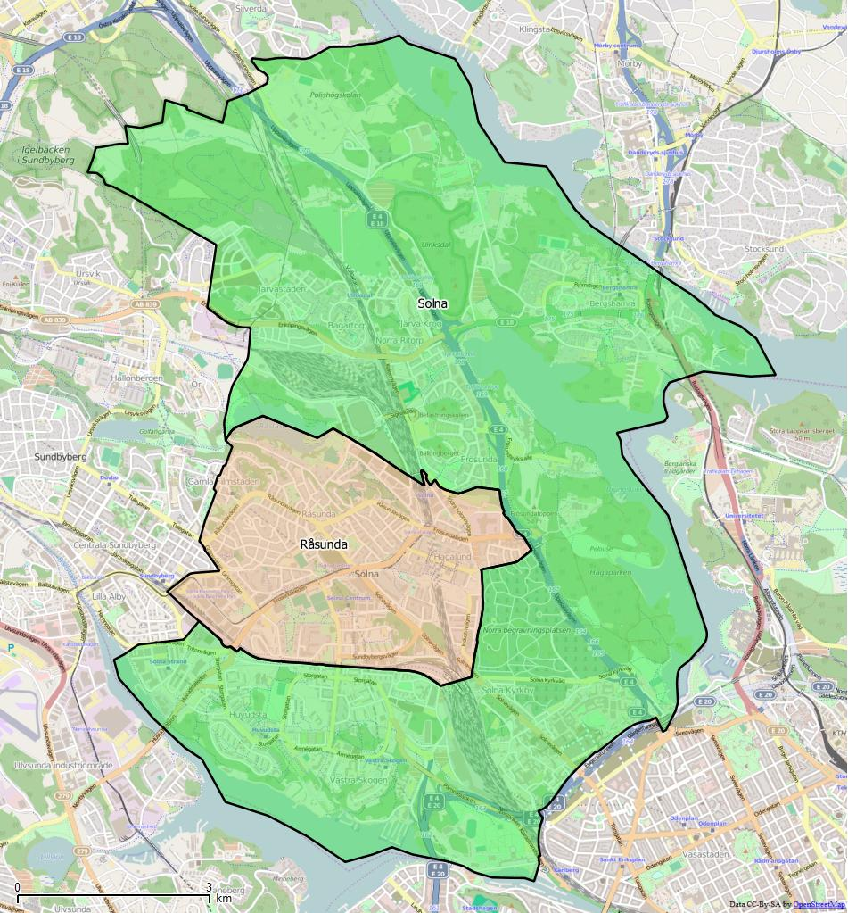 Distriktsindelningen i Skurups kommun World file: 13.93405170747072574 0 0 -13.93405170747072574 1998168.74081384297460318 8267852.92301751393824816